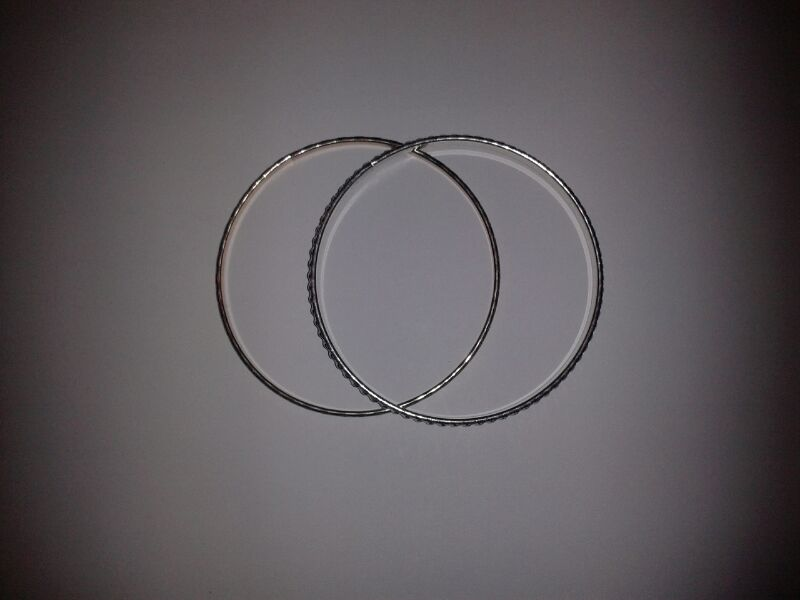 Són braçalets propis per a una entrada en Viquipèdia